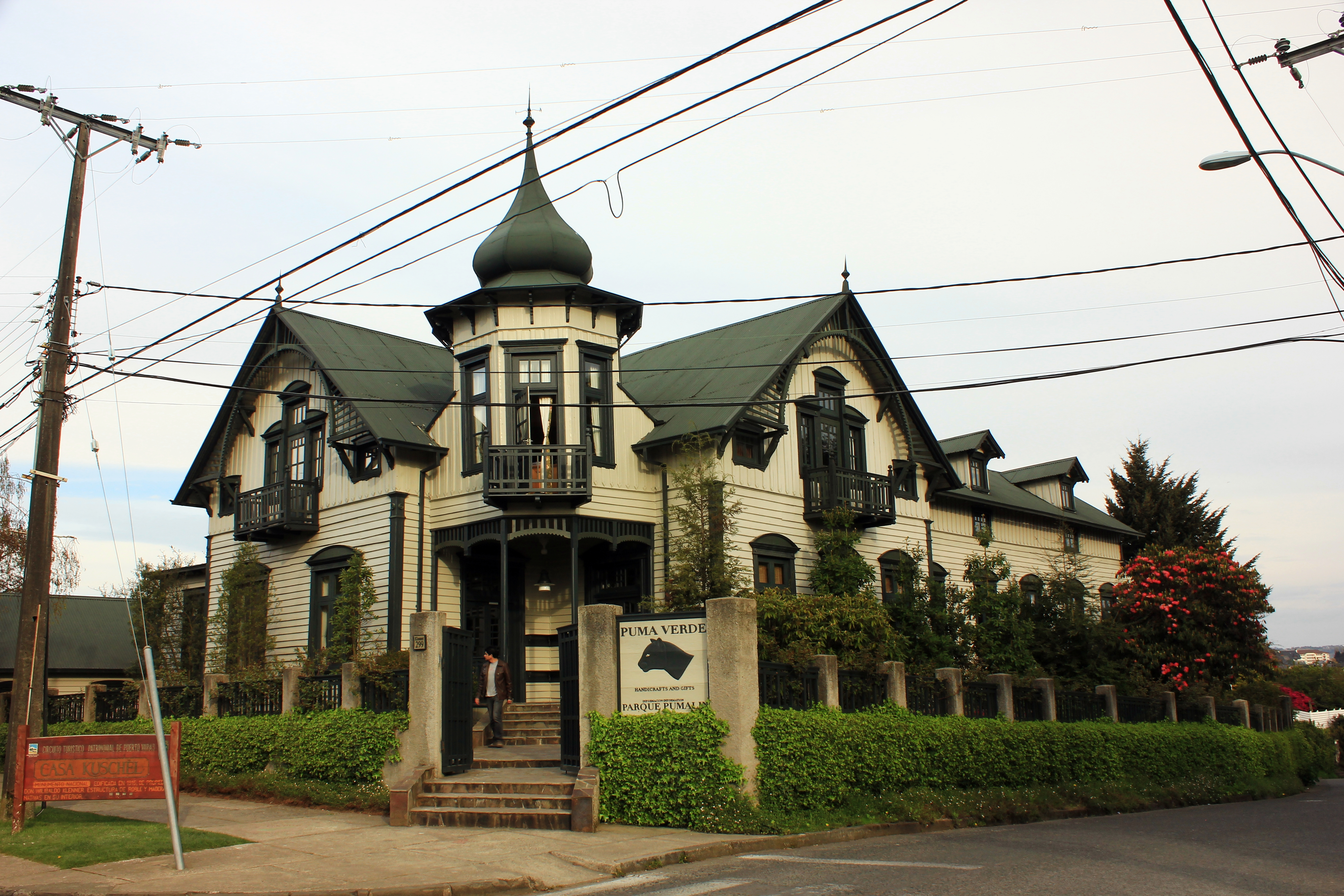 Casa Kuschel, Puerto Varas This is a photo of a national monument in Chile: 722